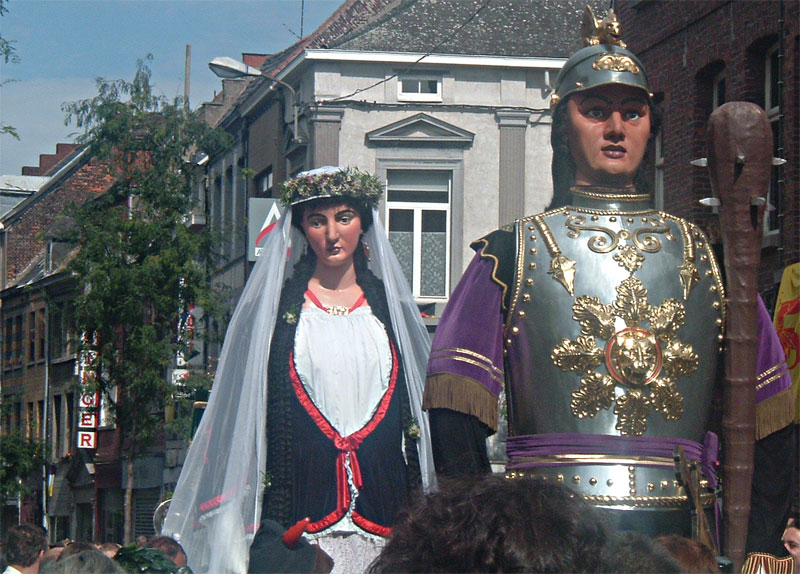 M et Mme Goliath, cortège des géants à Ath